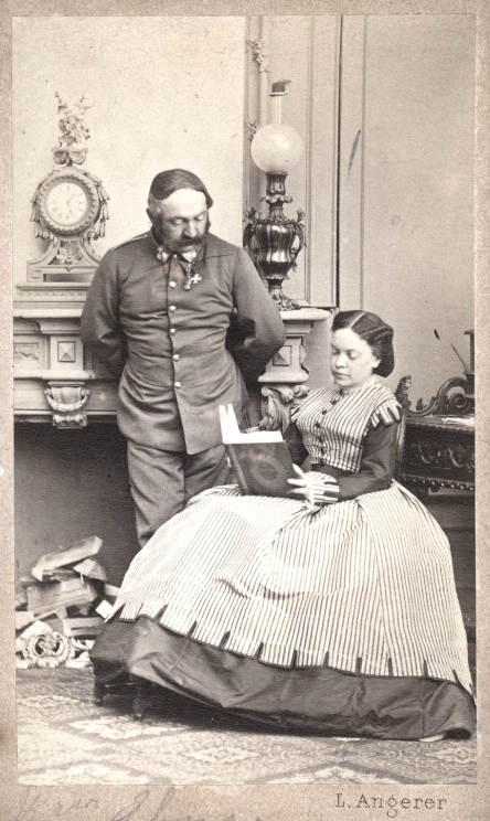 Marie von Ebner-Eschenbach mit ihrem Cousin und Ehemann Cousin Moritz von Ebner-Eschenbach (1815–1898).